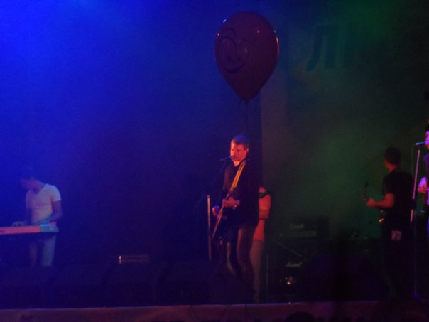 День города